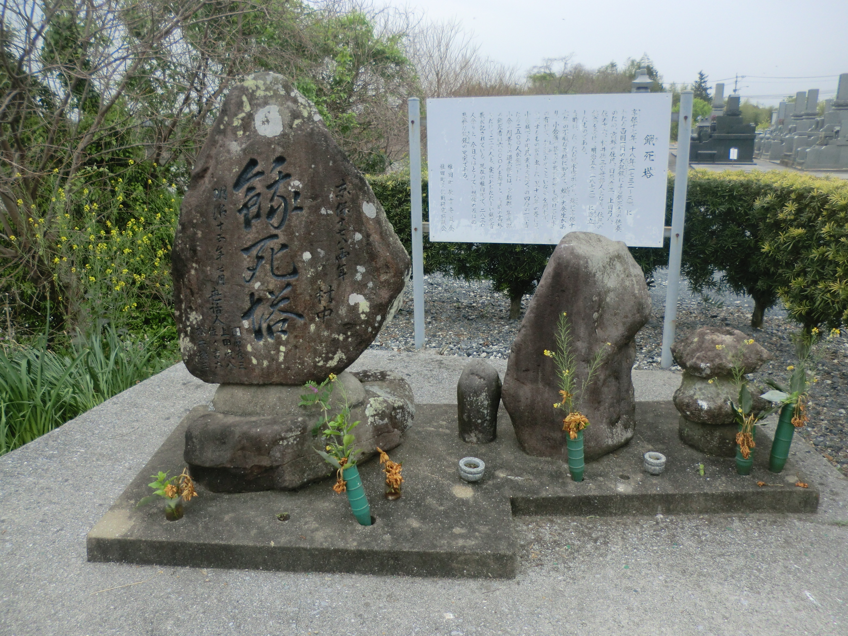 享保の大飢饉の際、築上郡の高塚地区において飢えのために亡くなった住民を供養する目的で明治時代に建立された餓死塔です。